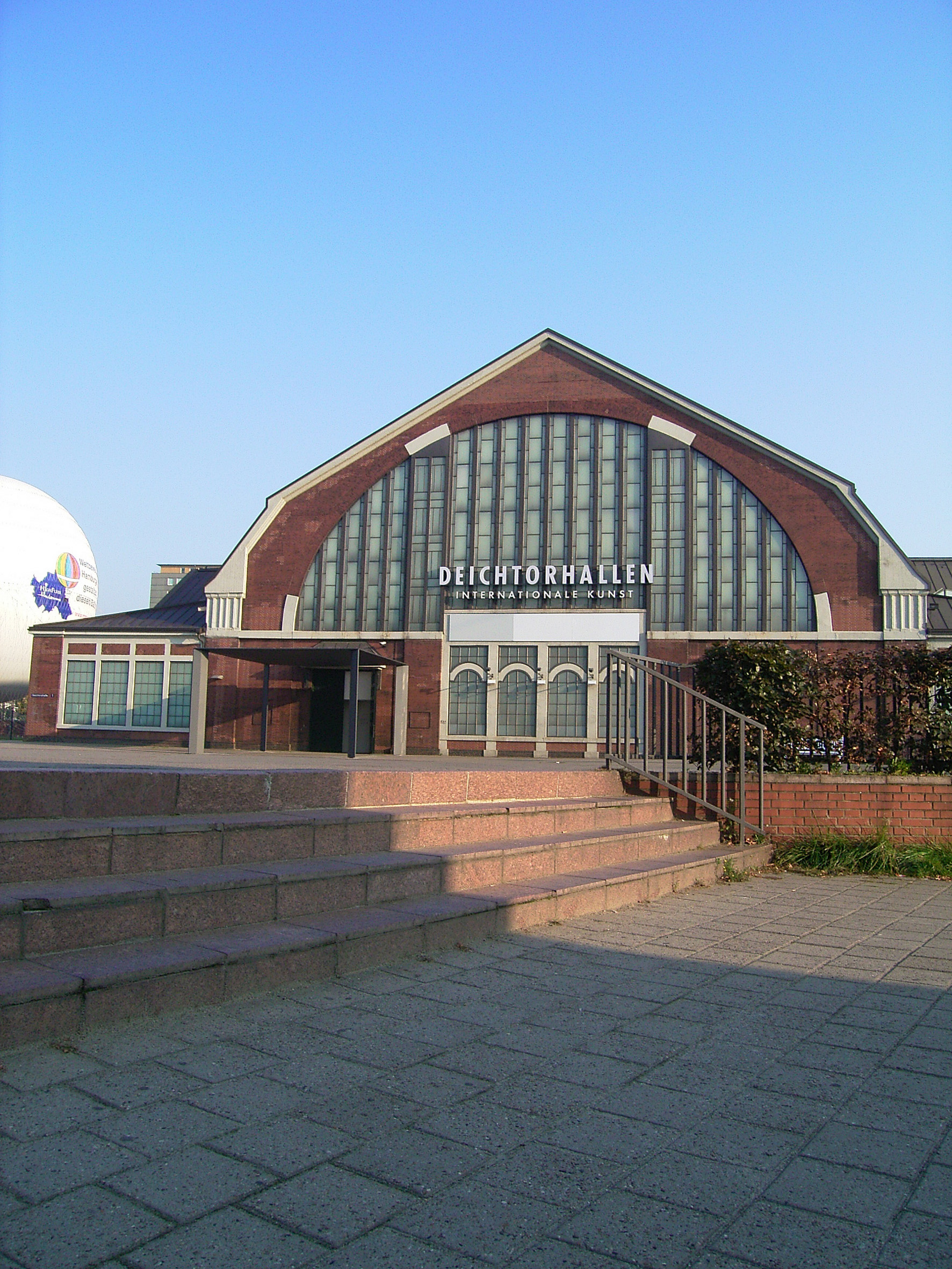 Blick auf die Halle für aktuelle Kunst This is a photograph of an architectural monument.